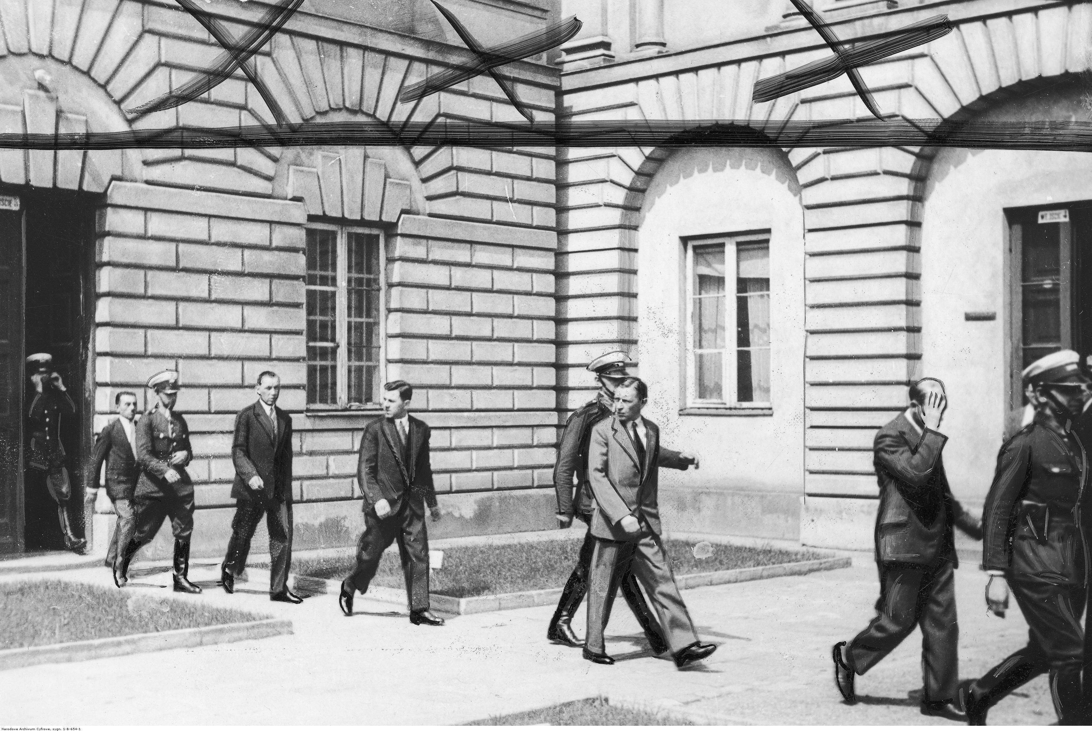 Proces przeciwko członkom gangu z warszawskiego targowiska Kercelak, którzy pod wodzą Łukasza Siemiątkowskiego ("Tata-Tasiemka") wymuszali haracz od kupców, przed sądem w Warszawie